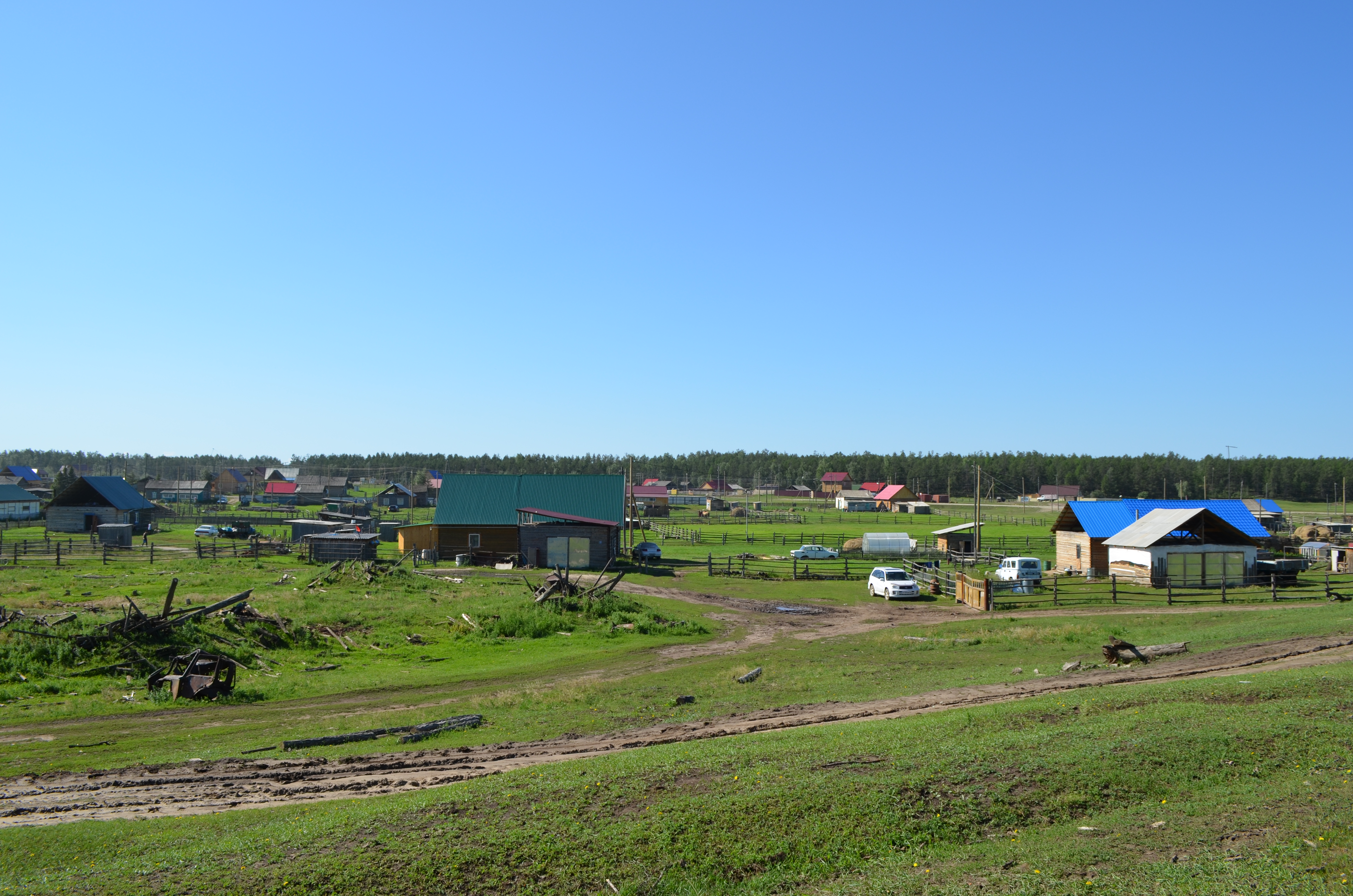 Село Майя Мегино-Кангаласского района Якутии. Крупное якутское село, население (на 2016) приближается к 10 тысячам жителей. В 1930-2007 годах село было центром Мегино-Кангаласского района (улуса). Населяют село преимущественно якуты. Оно также является малой родиной автора этих снимков, хотя я не был тут с 1993 года, то есть 23 года! Понятно, что с тех пор оно очень изменилось.